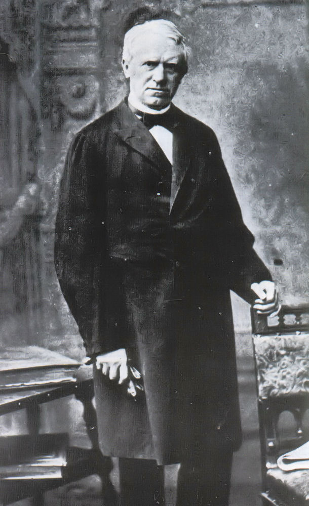 Bischof Georg Daniel TeutschRomână: Georg Daniel Teutsch